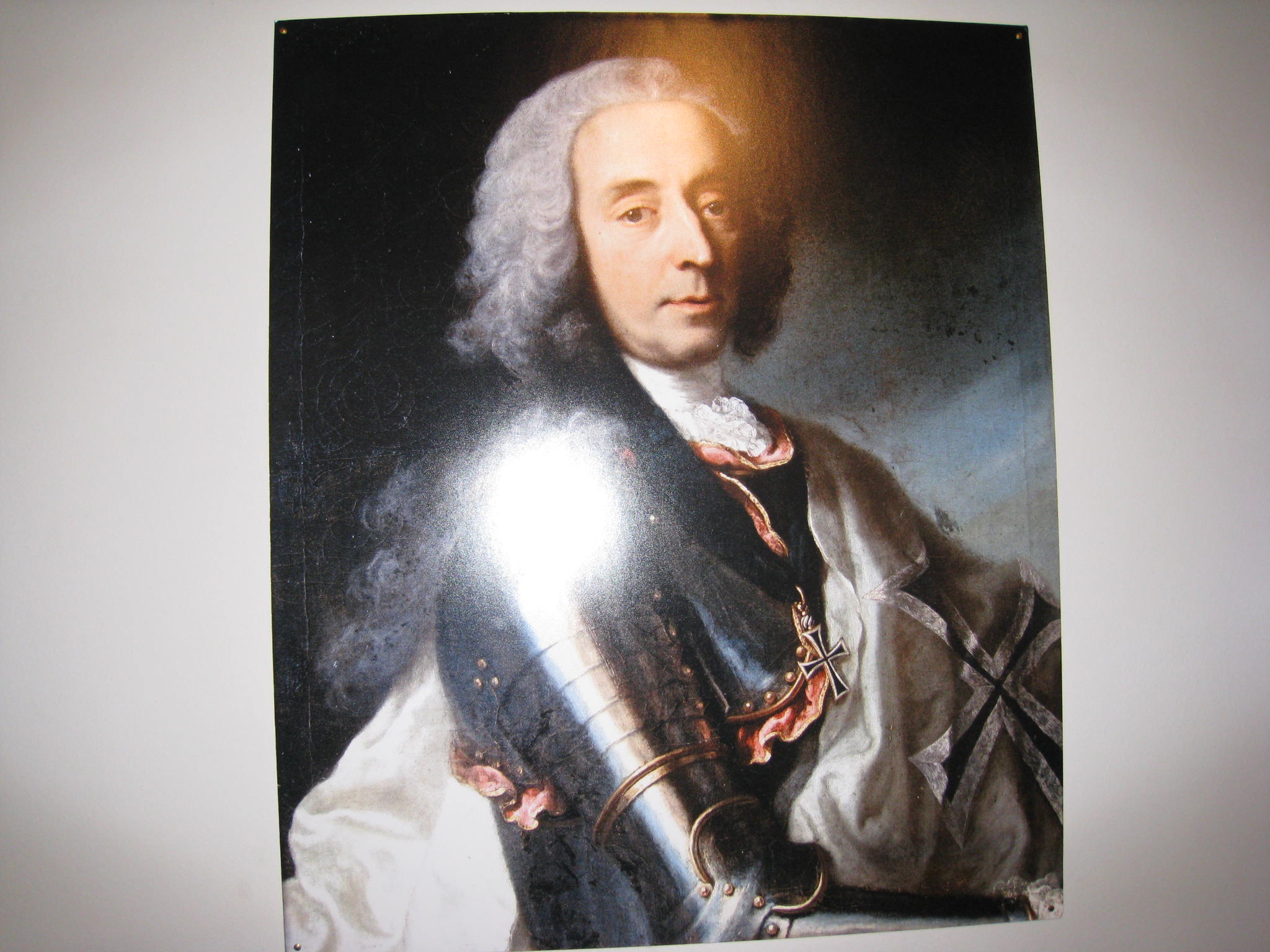 Unico van Wassenaer als landcommandeur Duitse Orde, schrijver van de Concerti_Armonici, in harnas